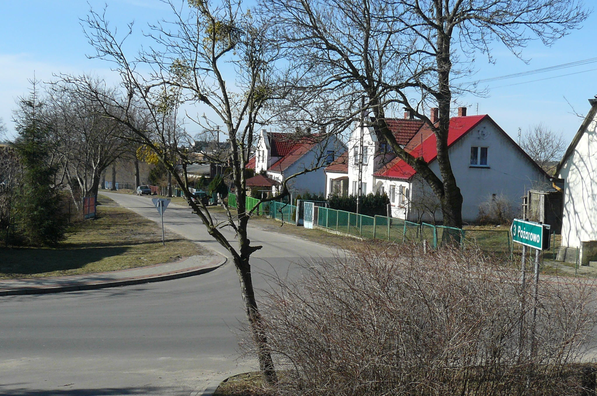 Biezdrowo.